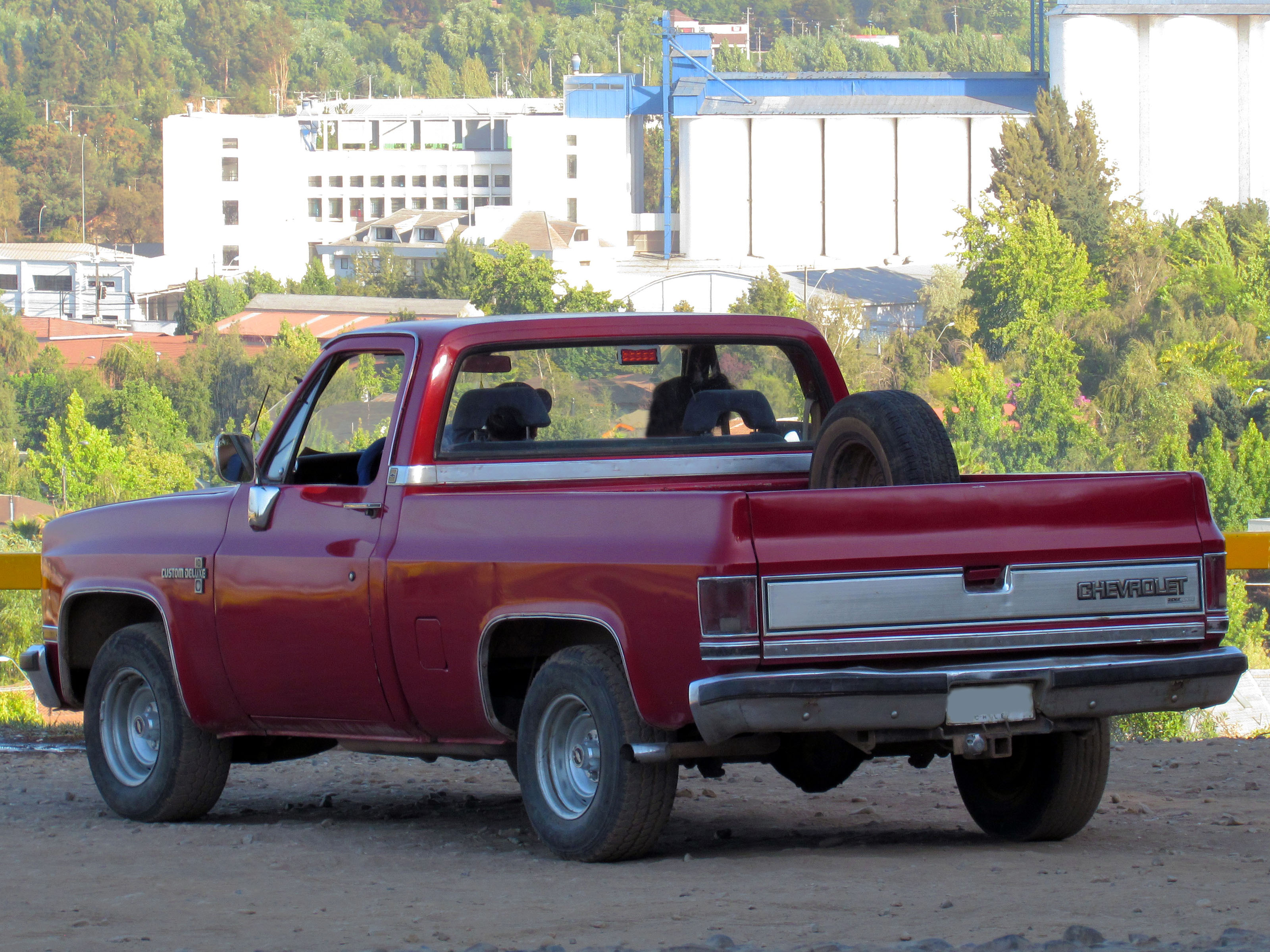 Chevrolet C-10 Custom Deluxe 1985